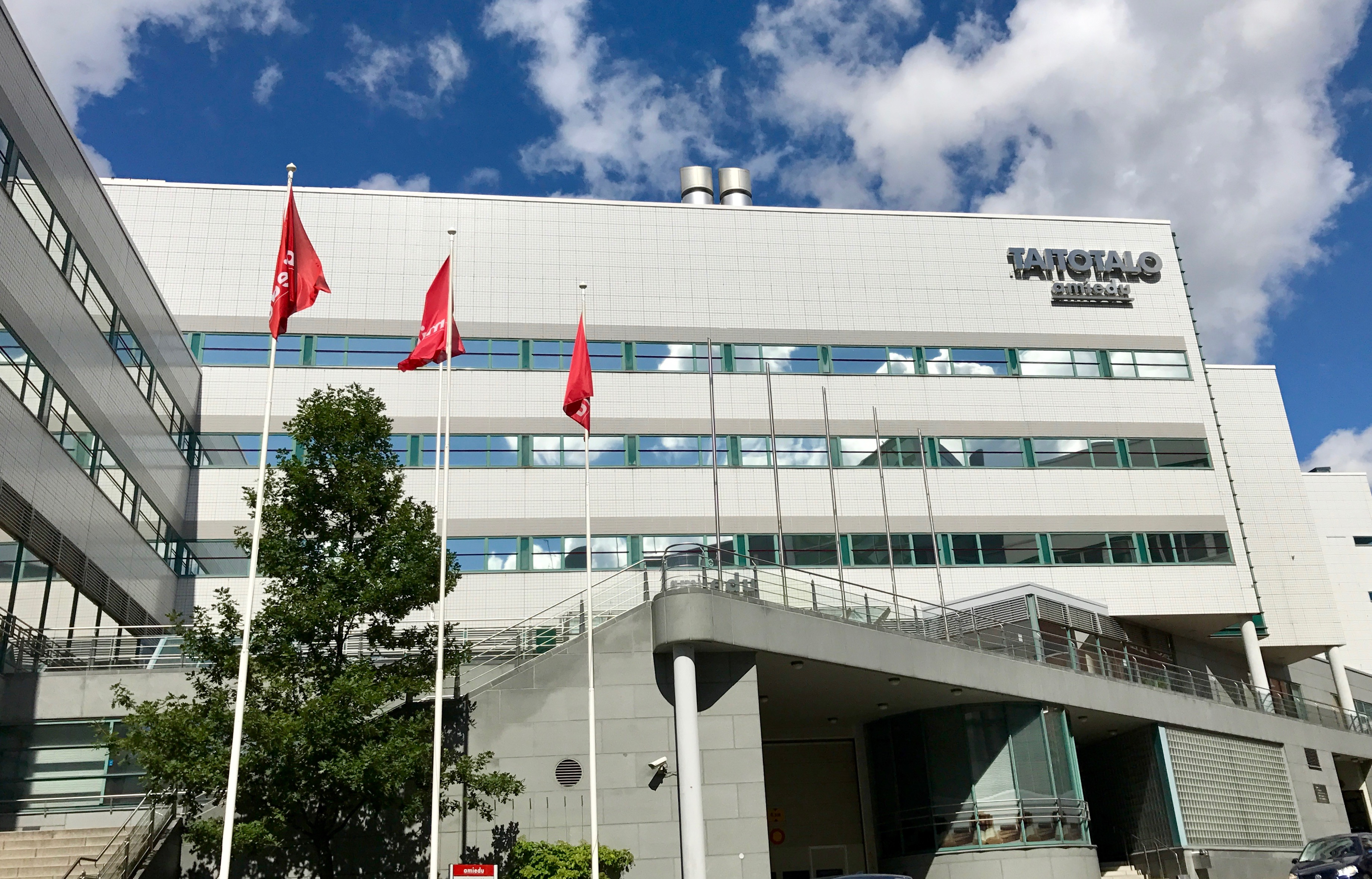 Amiedun päätoimipaikka Taitotalo Pitäjänmäellä.